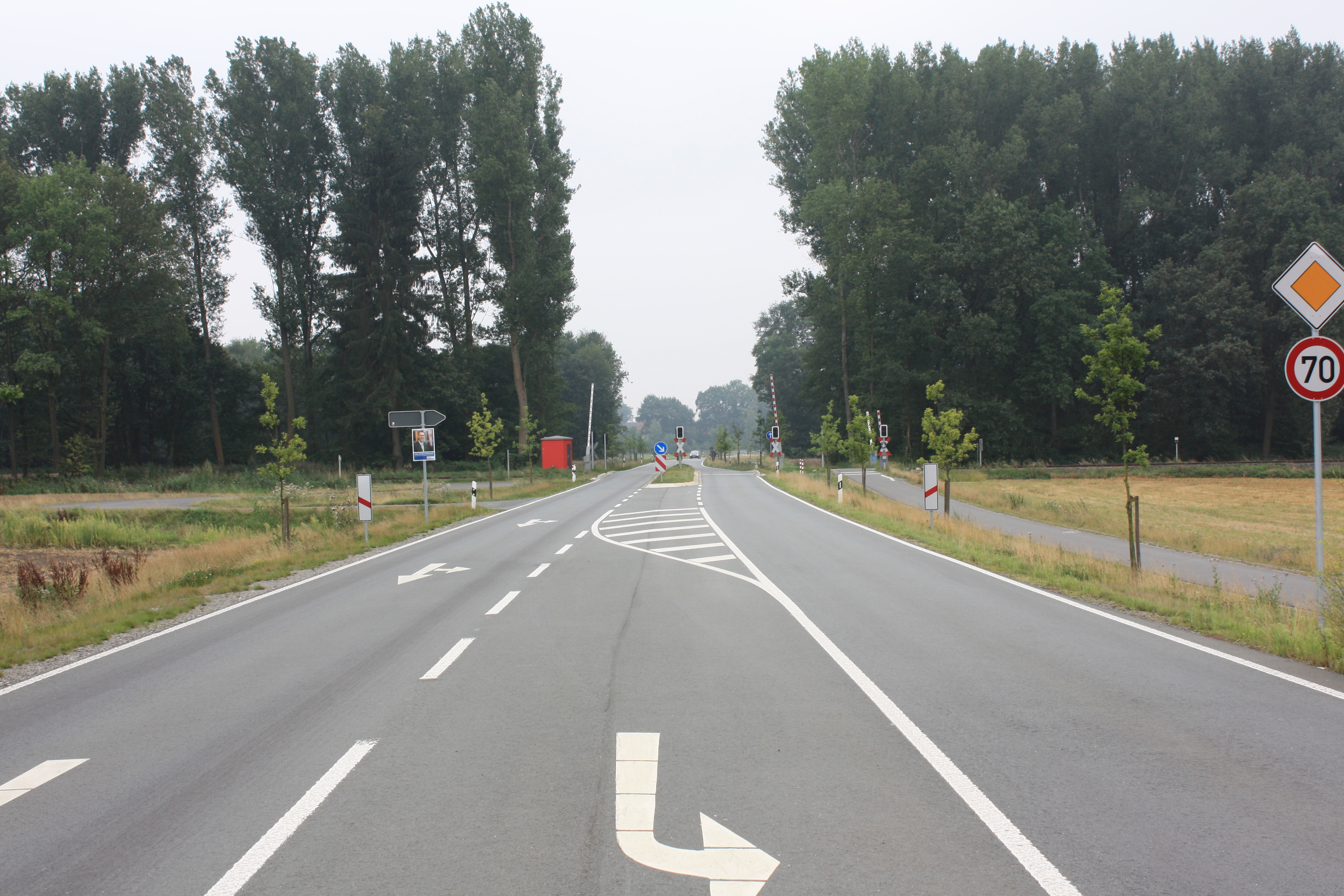 Anton-Bessmann-Ring in Marienfeld